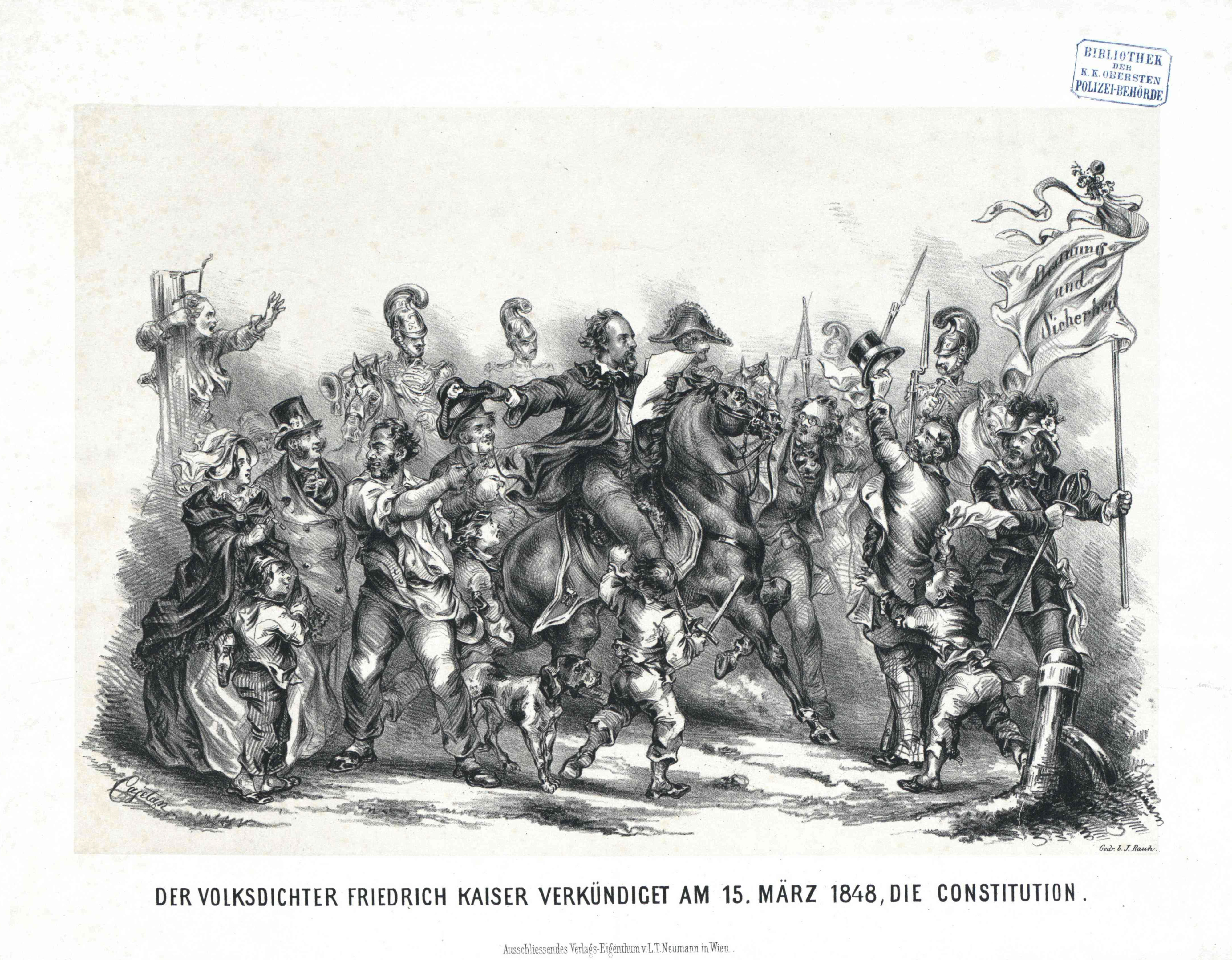 Der Volksdichter Friedrich Kaiser verkündiget am 15. März 1848, die Constitution